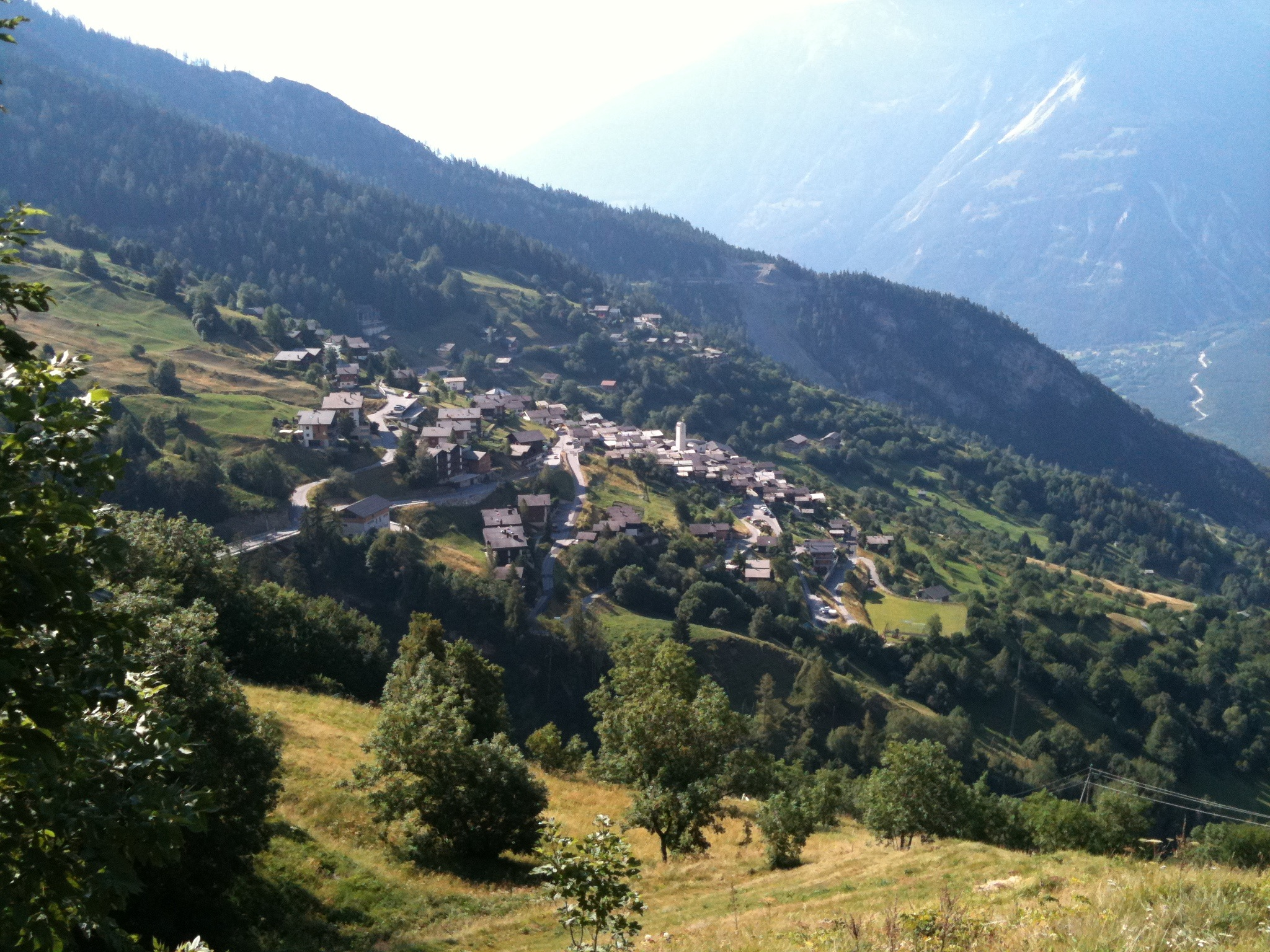 Albinen im Kanton Wallis